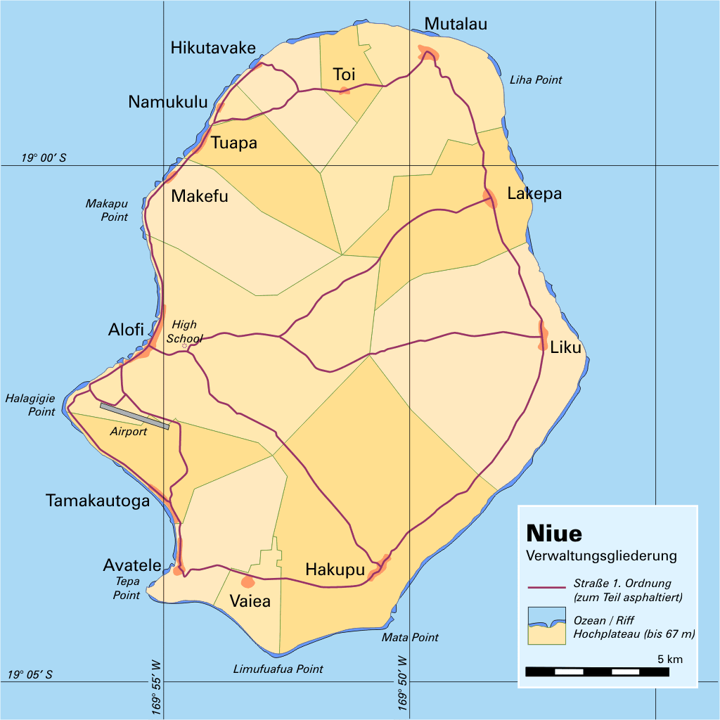 Niue Verwaltungsgliederung